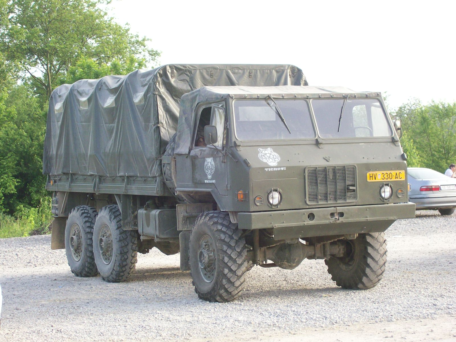 Kamion TAM Gbr Tigrovi (OSRH)